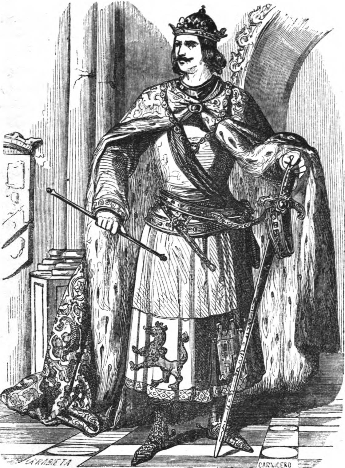 Grabado decimonónico que representa a Alfonso XI el Justiciero, rey de Castilla y León.